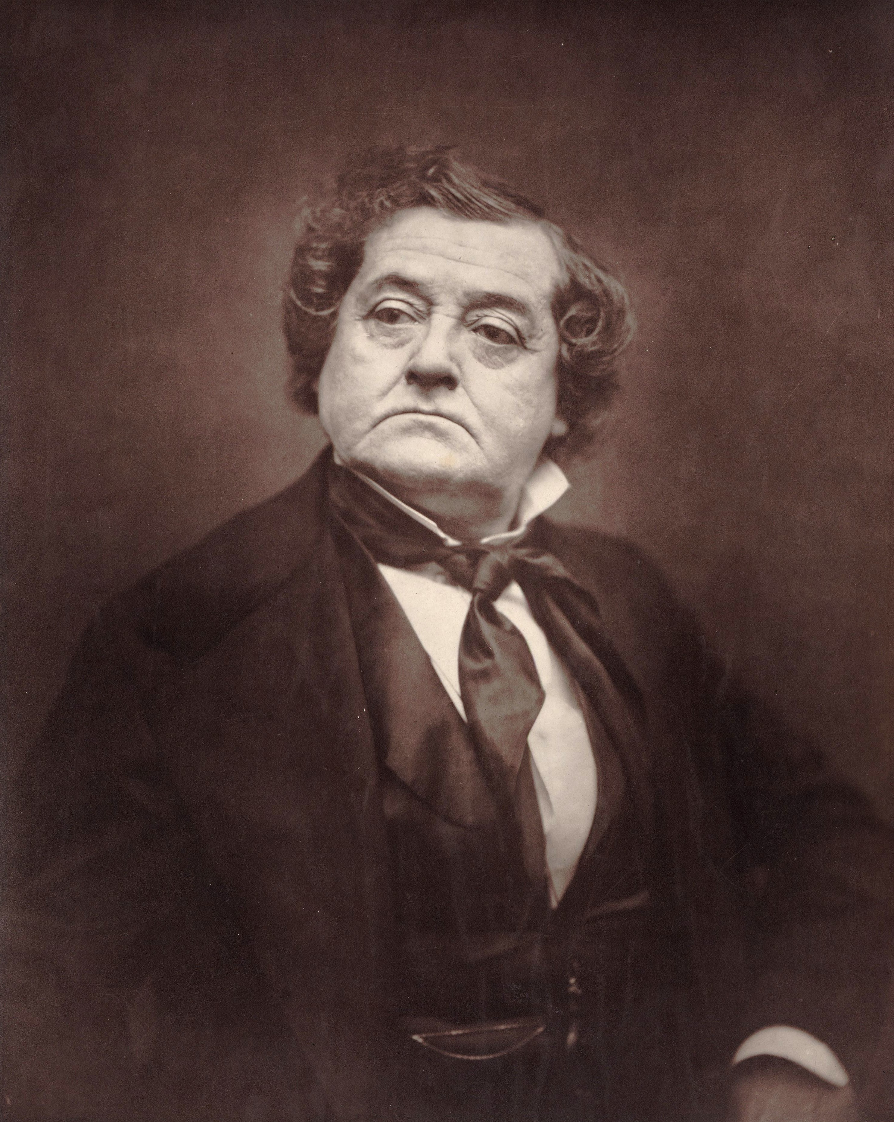 Etienne Carjat & Co. (France, 1828 - 1906) Frédéric Lemaitre, 1876-1884 Photograph, Woodburytype, 9 x 7 1/2 in. (22.86 x 19.05 cm)